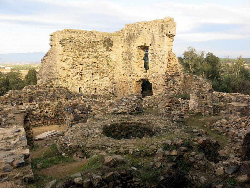 Castell de Sant Iscle a Vidreres - la Selva - Catalunya